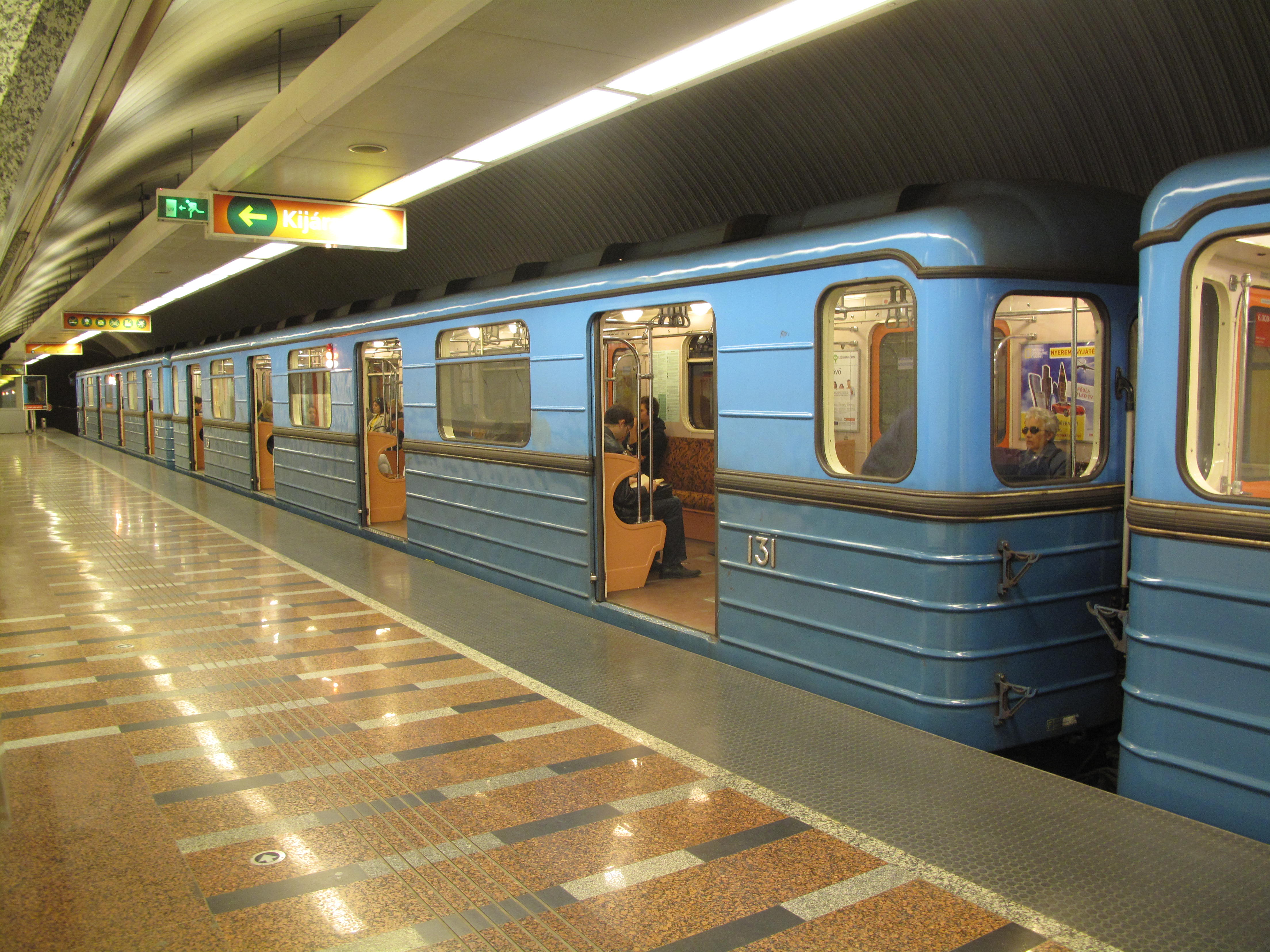 Budapešť